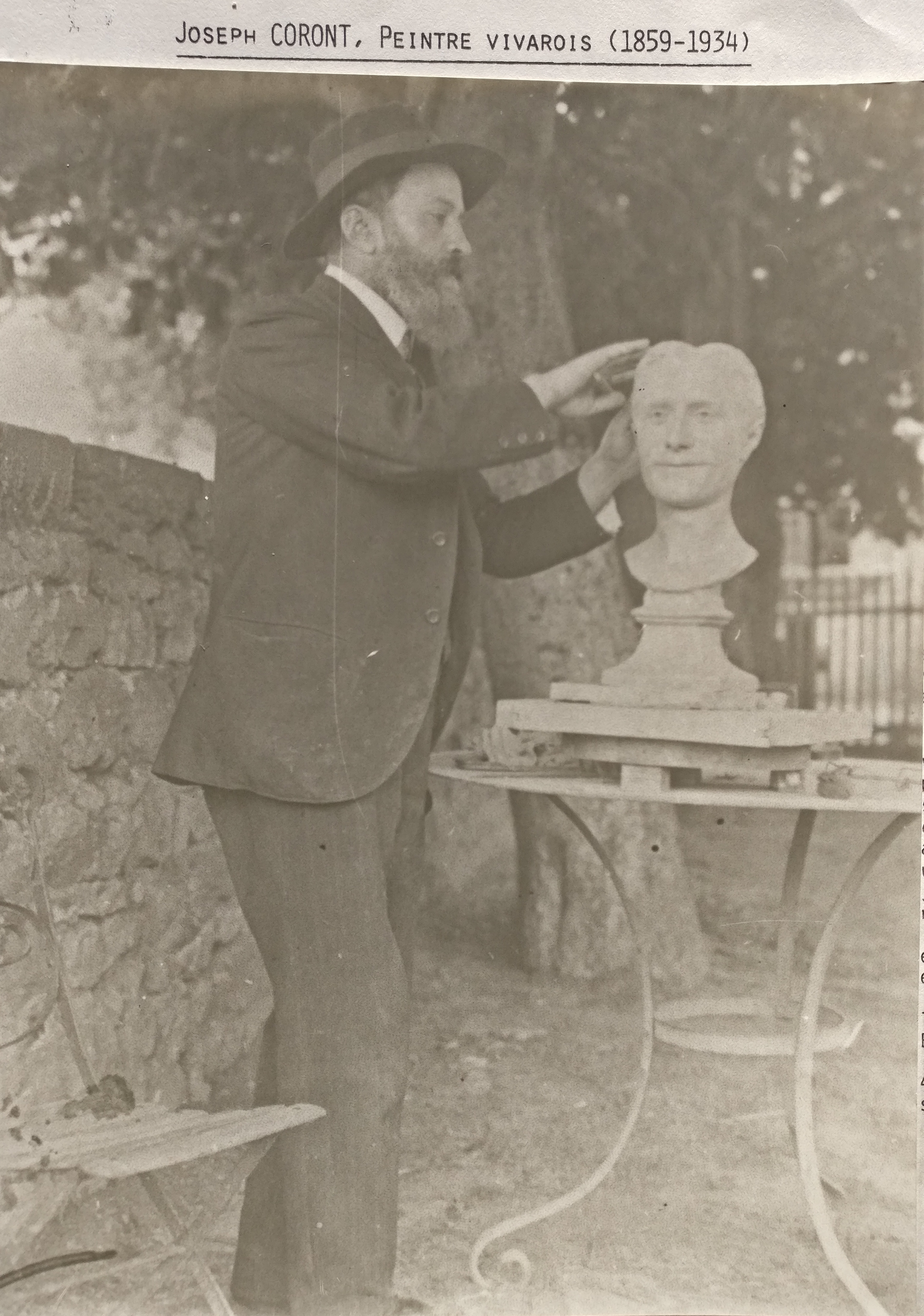 Joseph Coront, en train de sculpter le buste de Marcel Delaigue